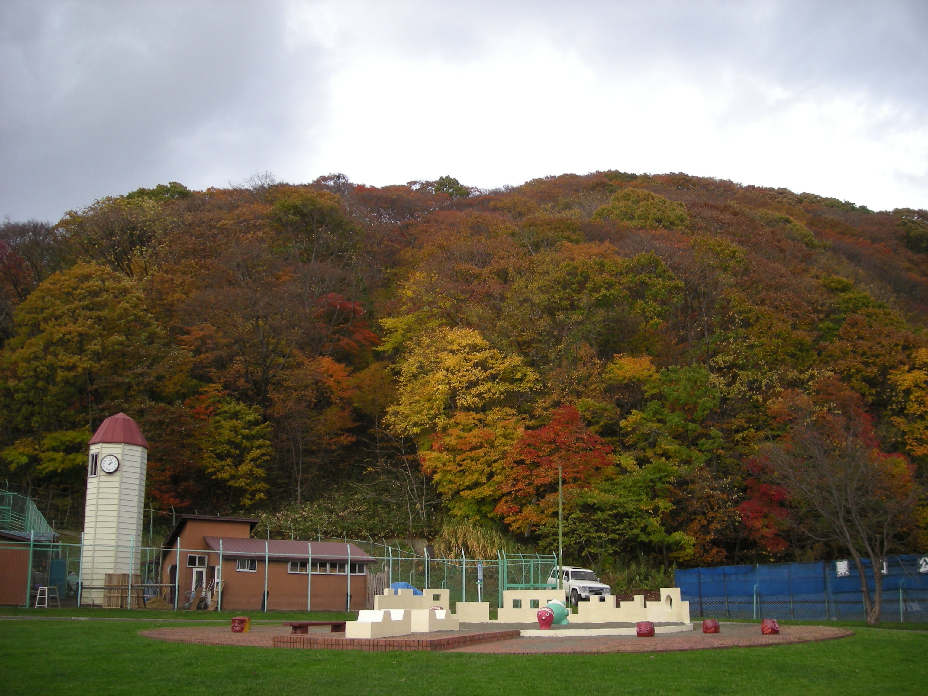 Park of Kuriyama／栗山公園・紅葉